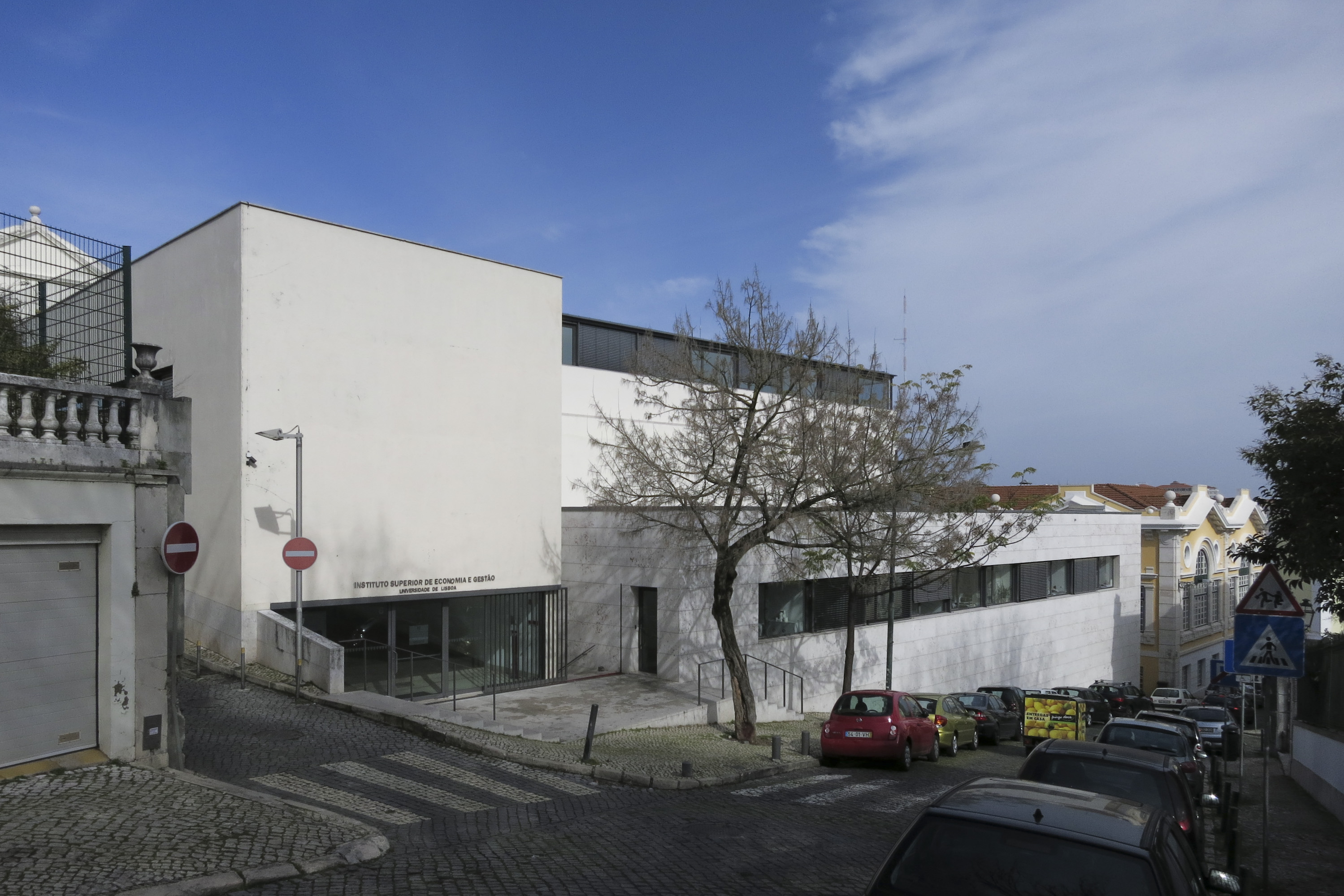 Instituto Superior de Economia e Gestão, Lisboa; Arq. Gonçalo Byrne